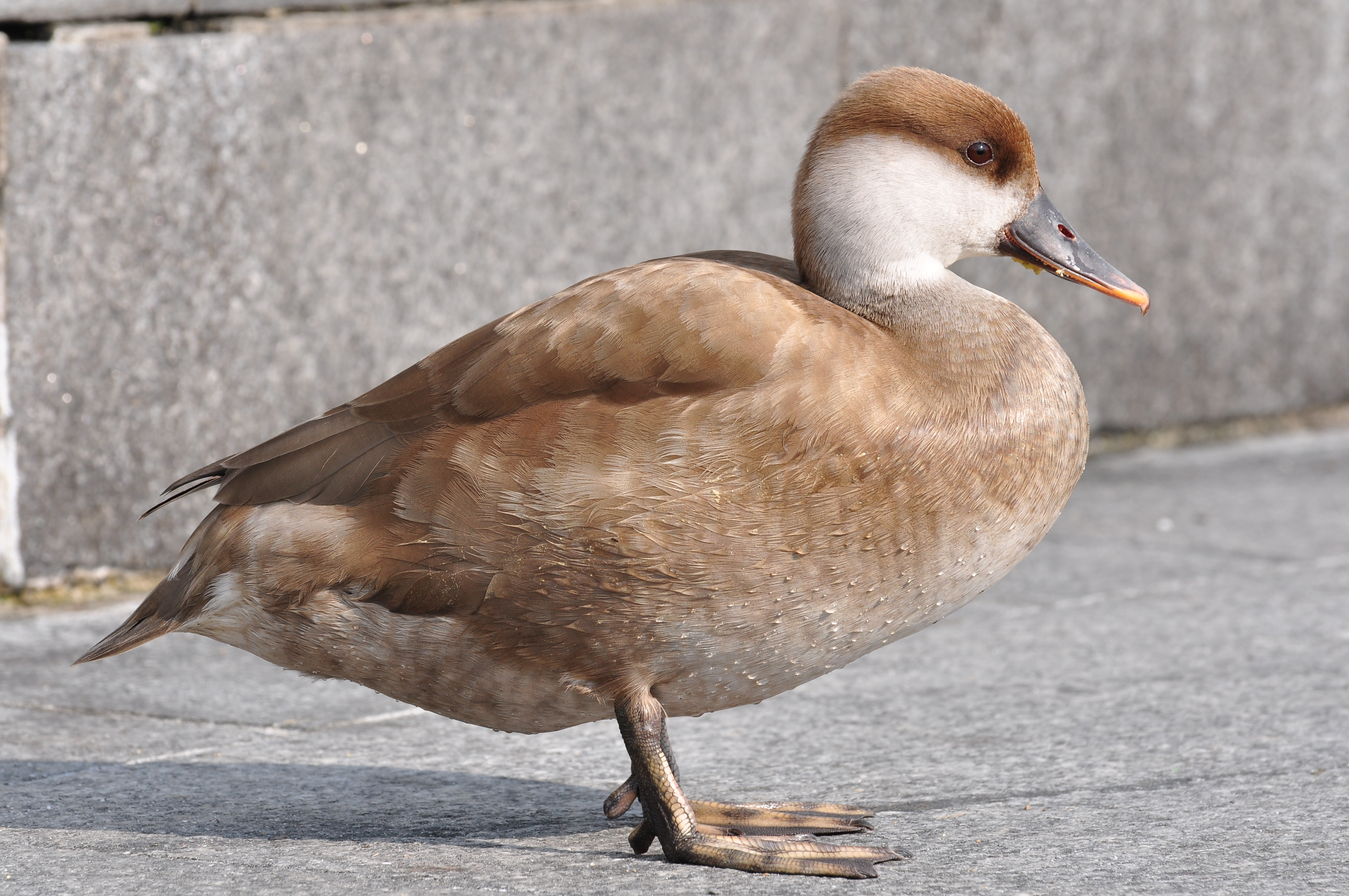 Netta rufina, Fischmarktplatz in Rapperswil (Switzerland)